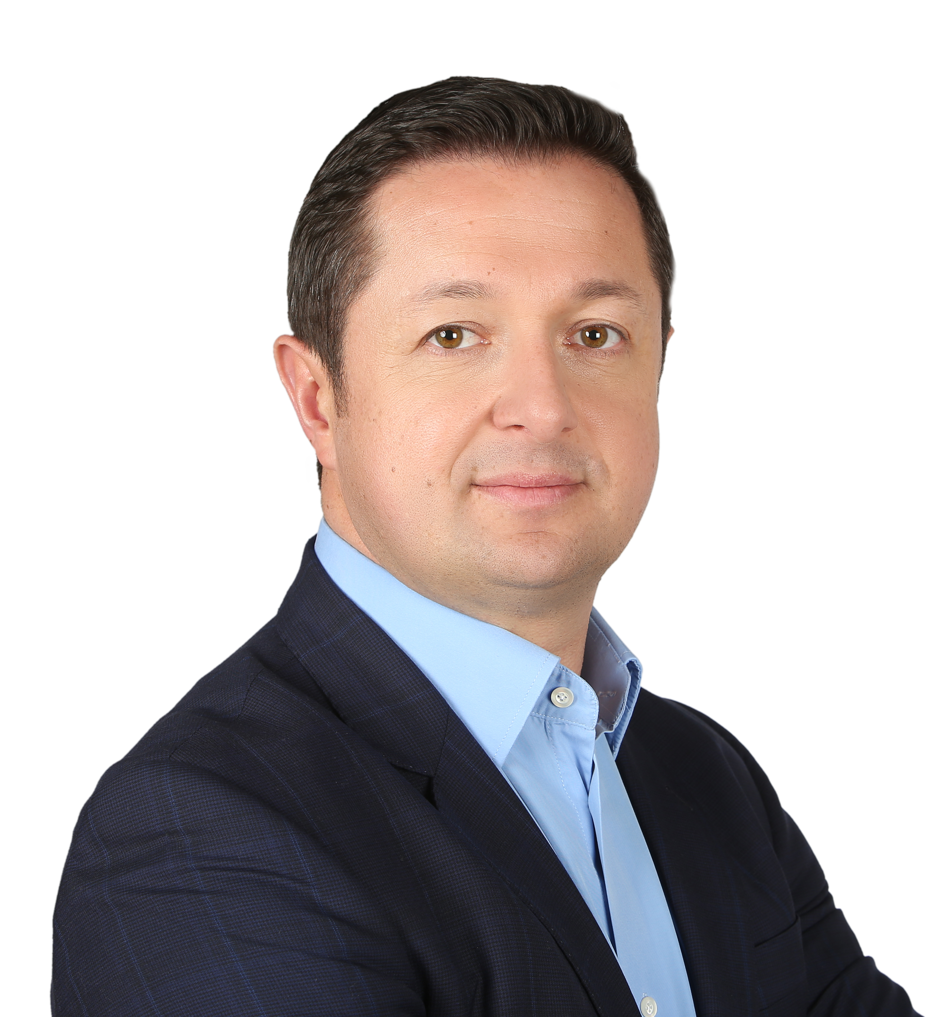 Profil